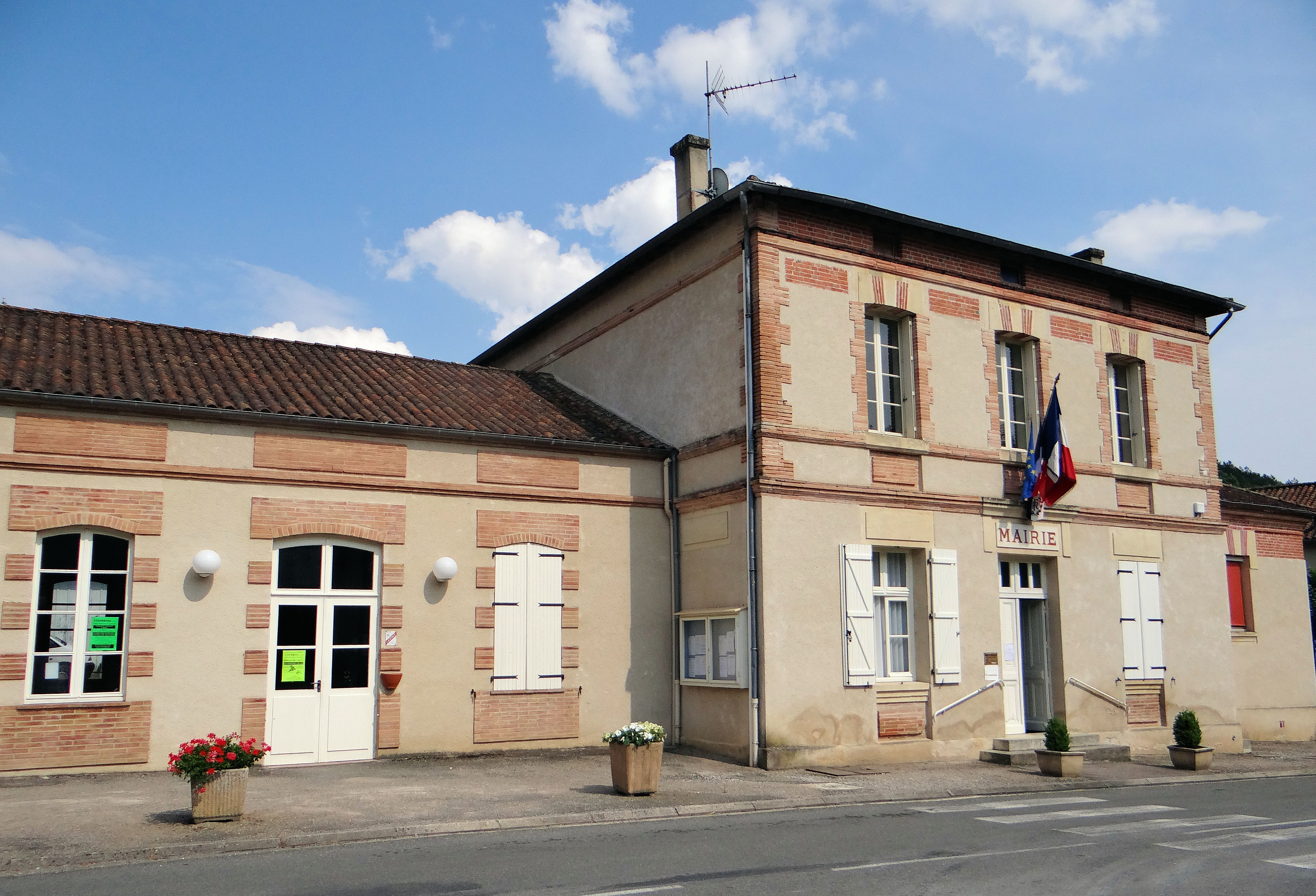 Touffailles - Mairie